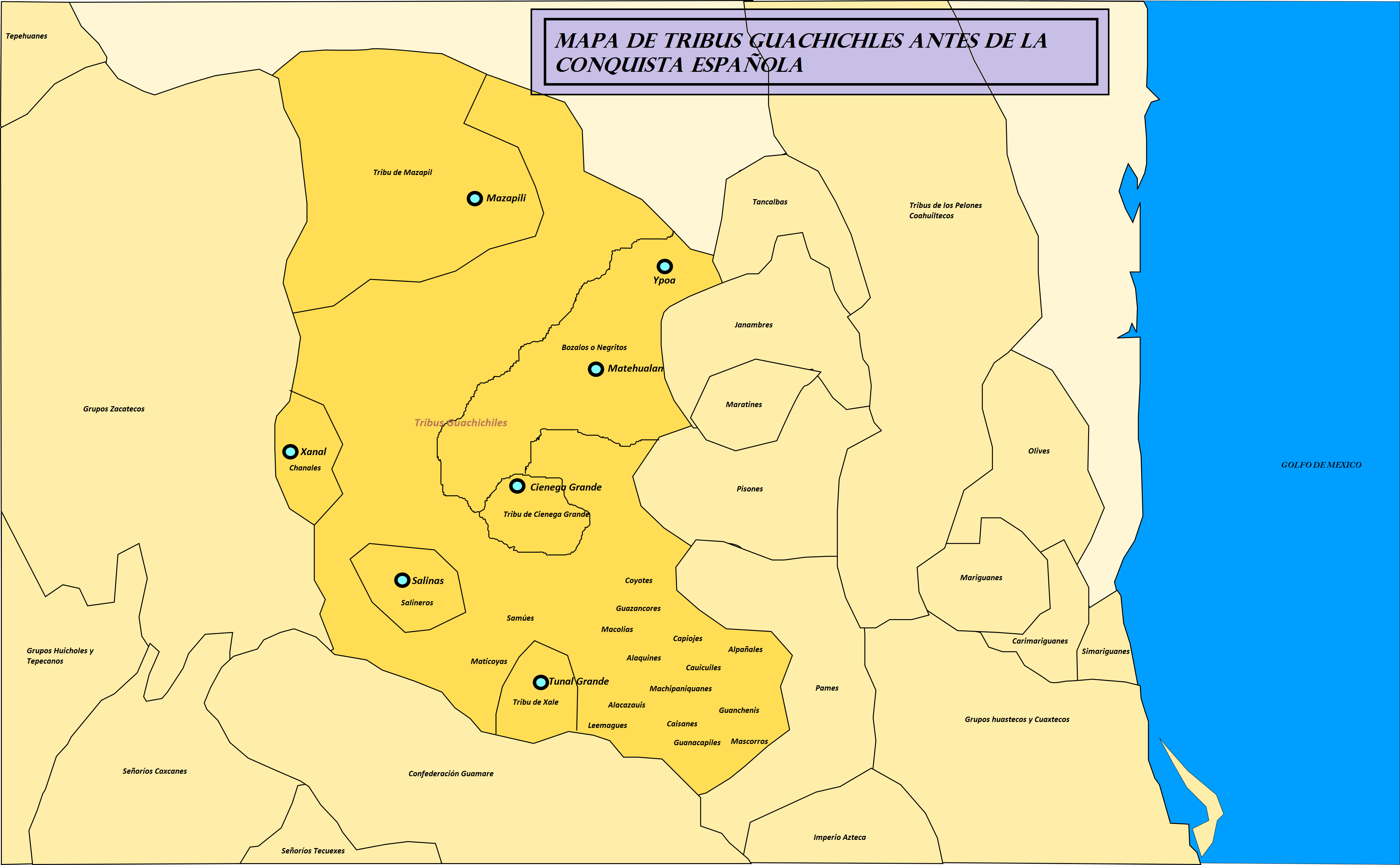 Mapa de los territorios que abarcaba la etnia guachichil antes de ser conquistada.